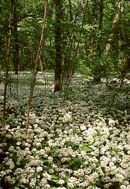 Monza (Parco): fioritura di Allium ursinum nel Parco della Villa Reale di Monza